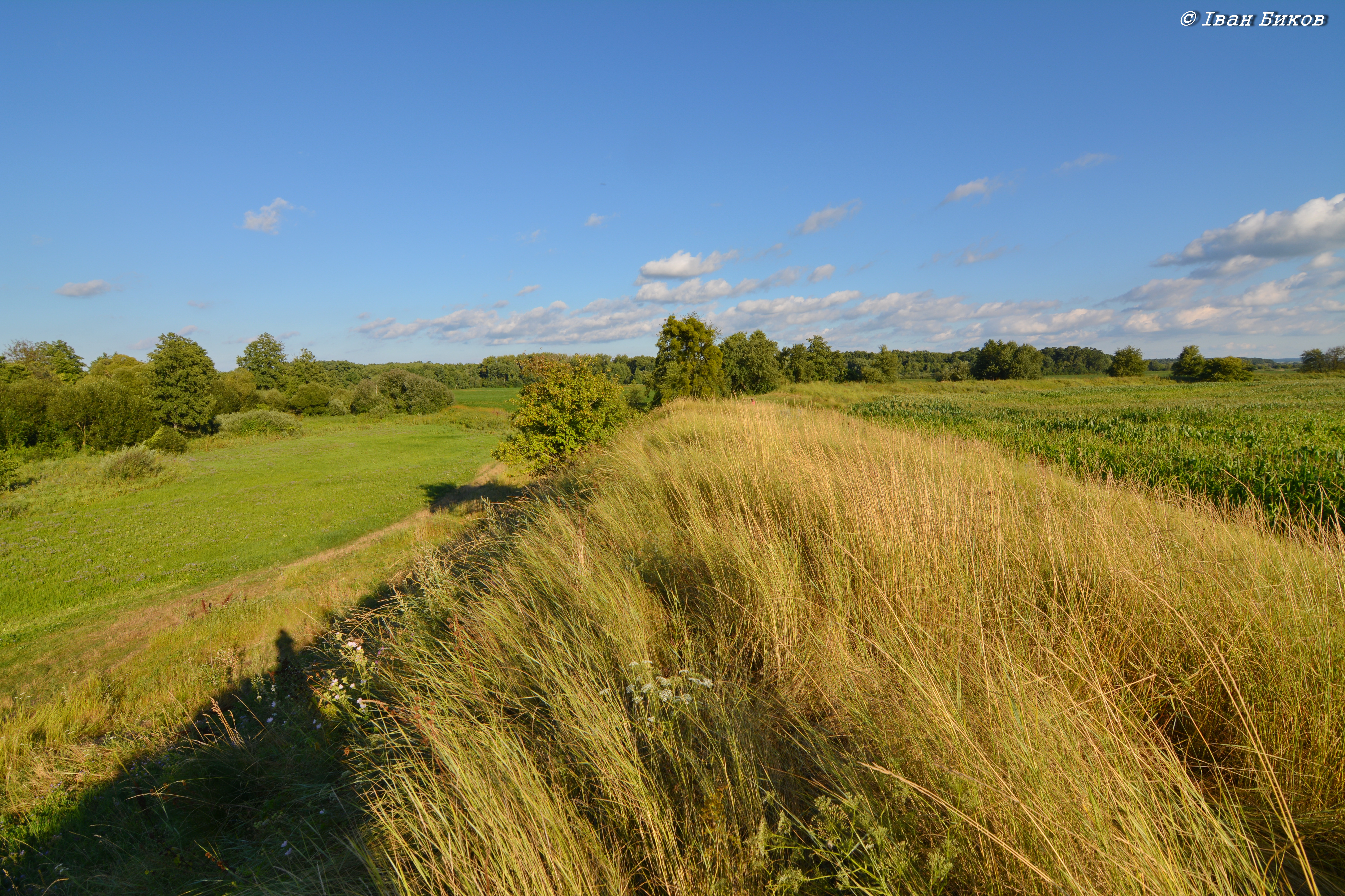 Валы Бушевского городища достигают 5 м в высоту